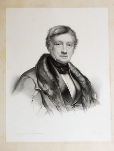 Porträt Melchior Boisserée (Lithographie, 1840)